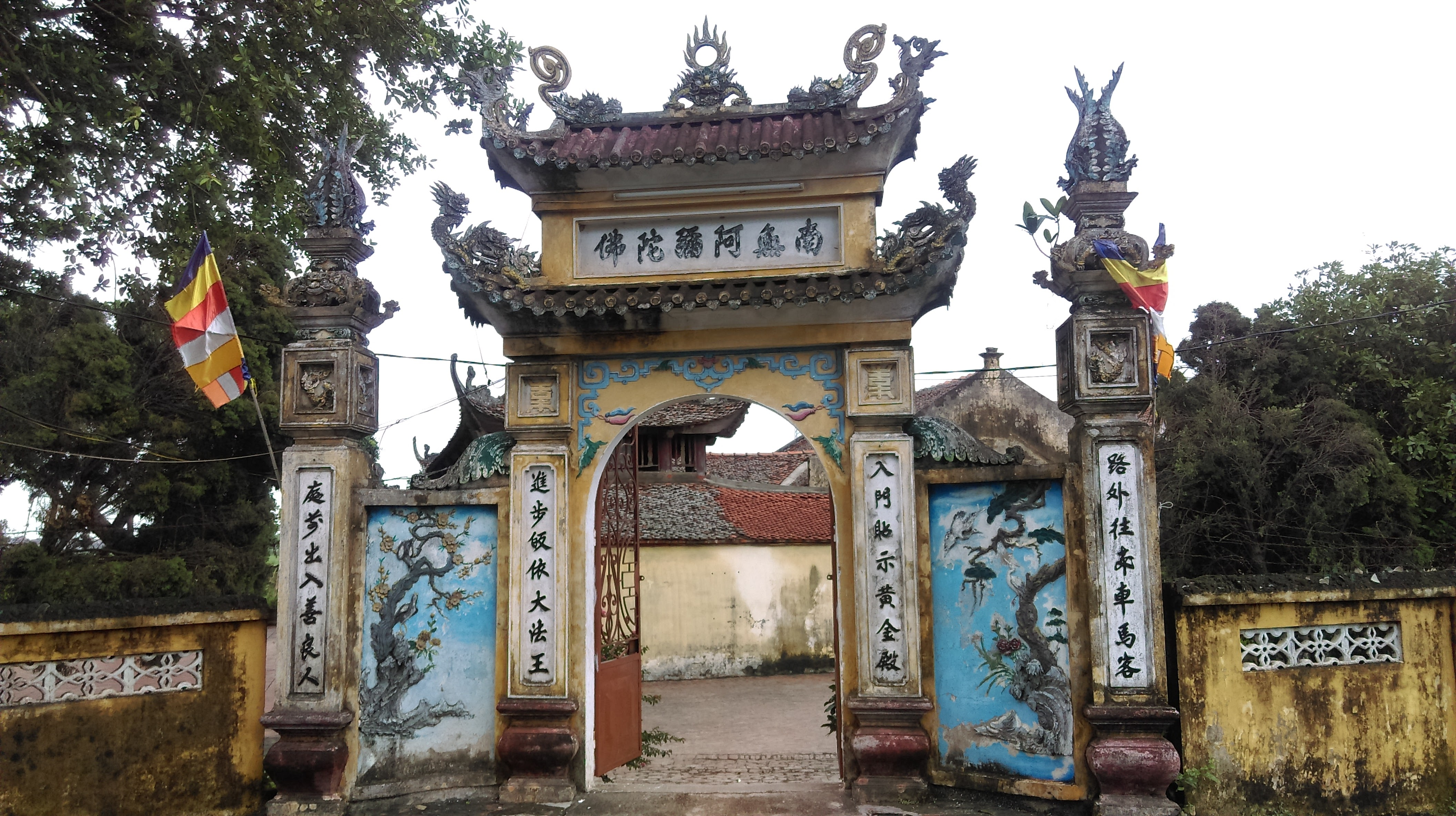 Chùa Pháp Vân, Văn Bình, Thường Tín, Hà Nội